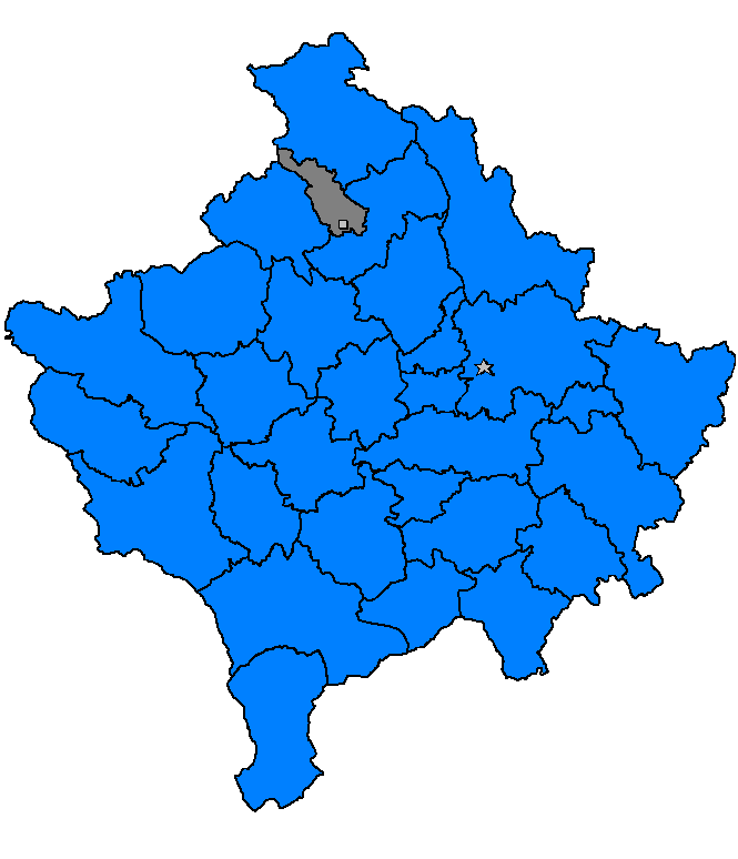 Zveçan, Kosovë 2006